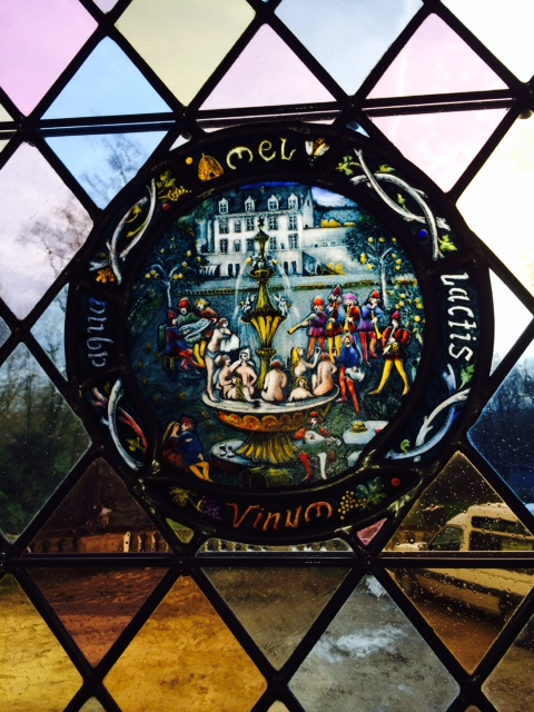 Vitraux